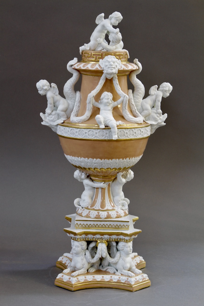 Vase ornemental représentatif de la naissance du style néo-classique du 18 ème siècle, étant la concrétisation d’une gravure de Jacques Saly (1717-1776) par la manufacture de porcelaine de Derby en Angleterre de 1773 à 1790. Deux exemplaires sont connus, l’un au musée Victoria and Albert Museum, l’autre au musée d'Indianapolis. Vase en trois parties avec support et couvercle, décoré de rose et de glaçage recouverts de putti appliqués, d’animaux marins, de festons et de sphinx en biscuit. En porcelaine tendre, coulée, peinte en émail rose et doré, avec parties en biscuit non émaillées Marqué par incision dans la matière à la base de la partie centrale N 19. Hauteur 41 cm, Largeur 21,5 cm à la base.